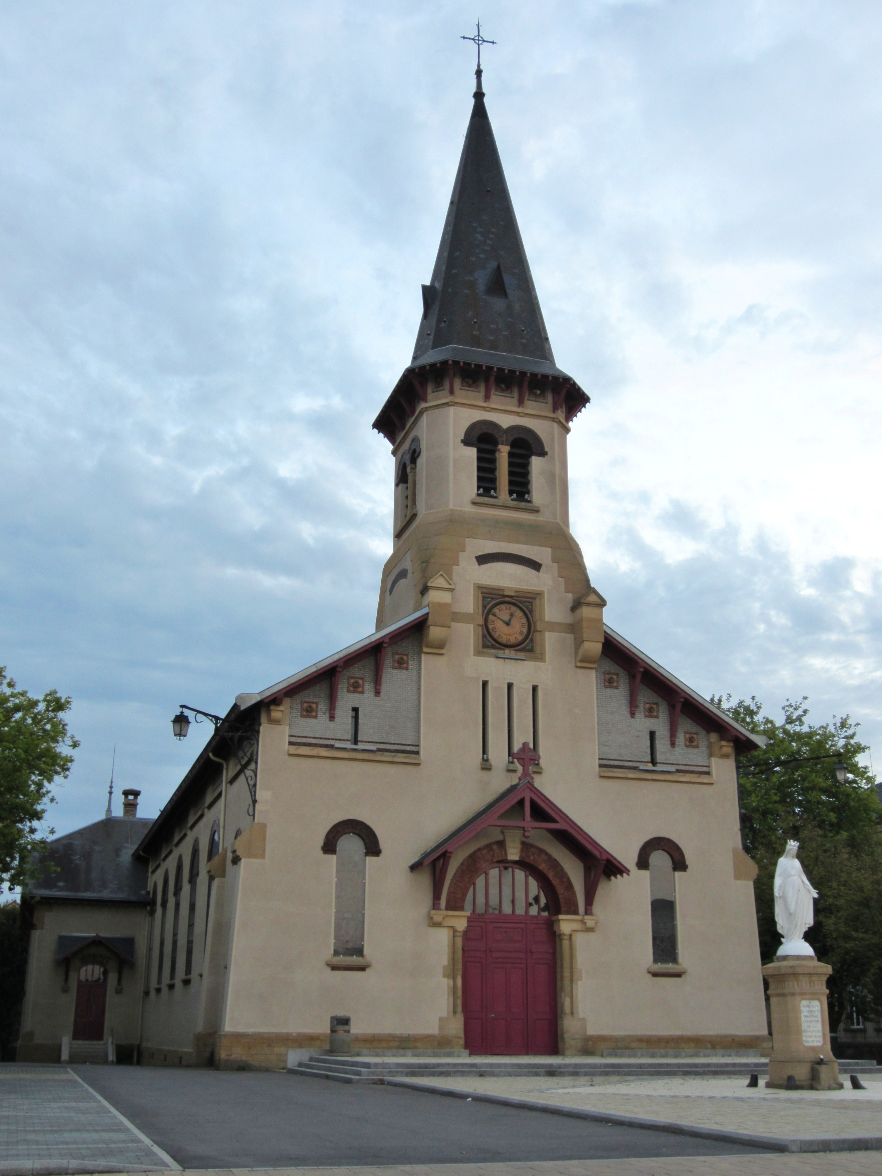 Description Église paroissiale Notre-Dame-de-Franchepré Joeuf Église paroissiale Notre-Dame-de-Franchepré Joeuf